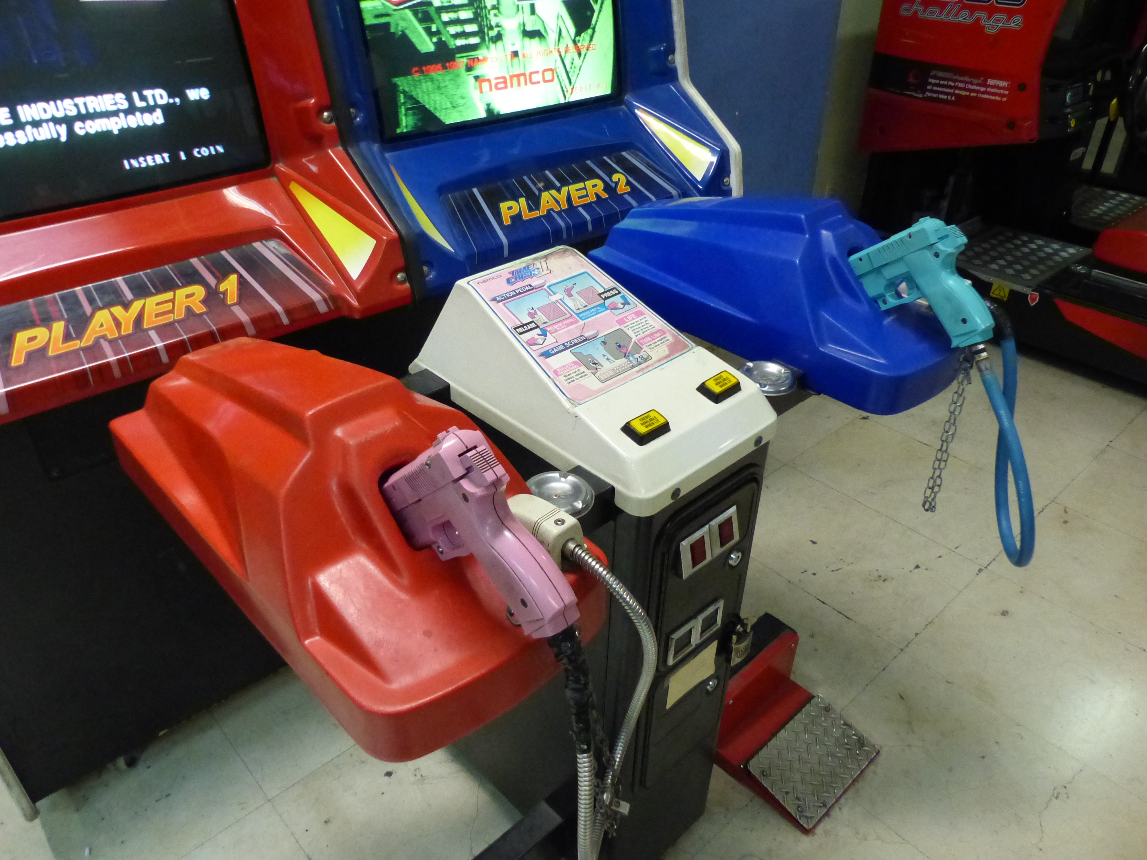 Time Crisis II, España